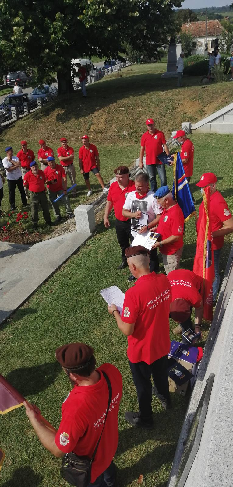 Генерали Ступар и Гури додељују посебно признање председнику УГ "Церски марш" Божидару Катићу